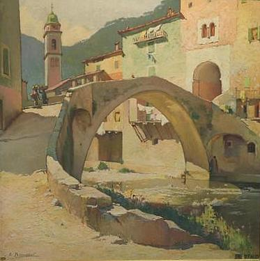 Le pont vieux du village de l'Escarène